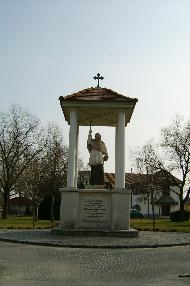 Nepomuki Szent János szobra, Kiskunfélegyháza. Eredeti állítás éve: 1799; helyreállítva 1994-ben